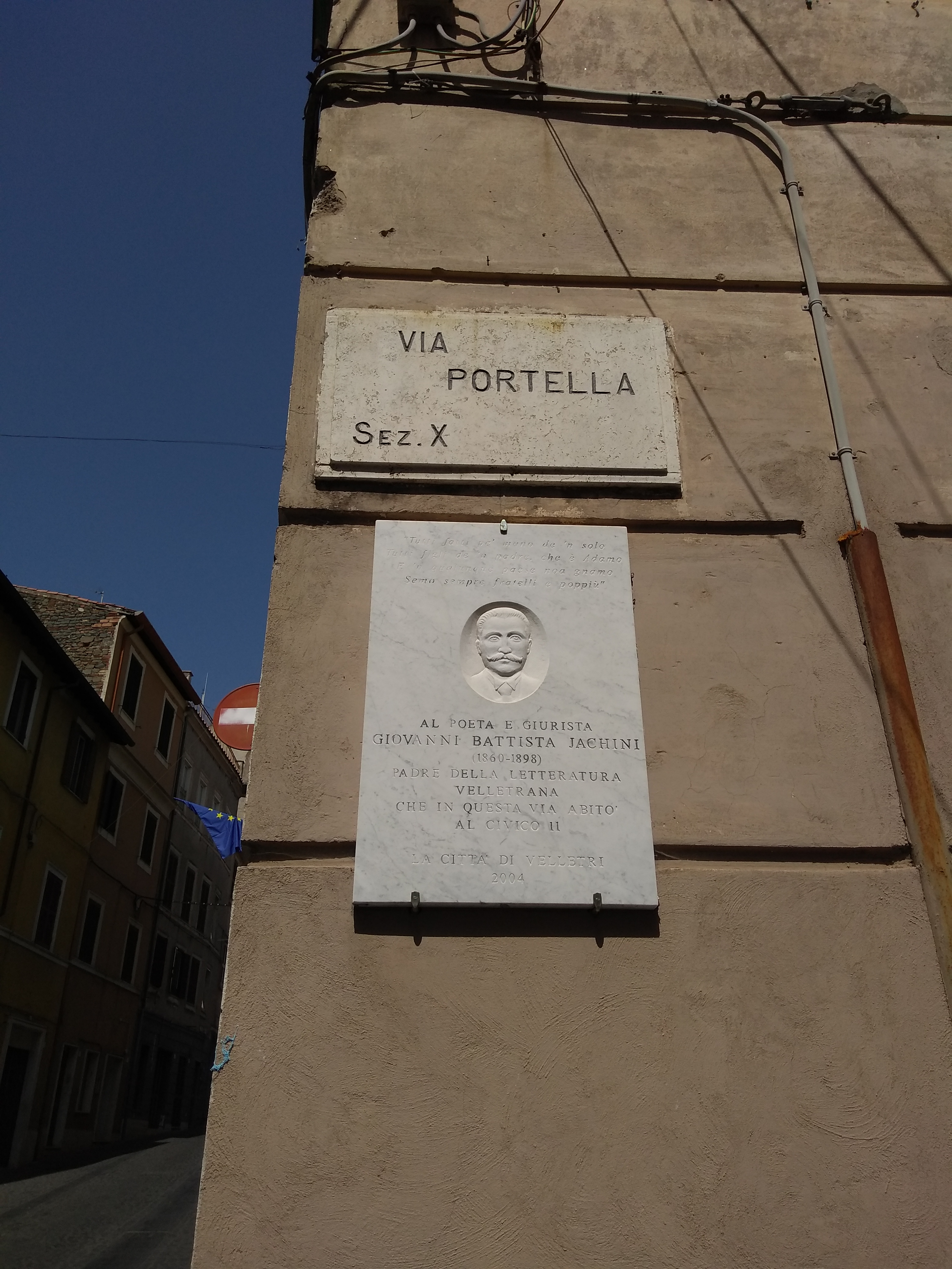 Targa a Giovanni Battista Iachini, autore di poesie in dialetto veliterno, posta all'inizio della strada del centro di Velletri in cui abitò (via Portella)